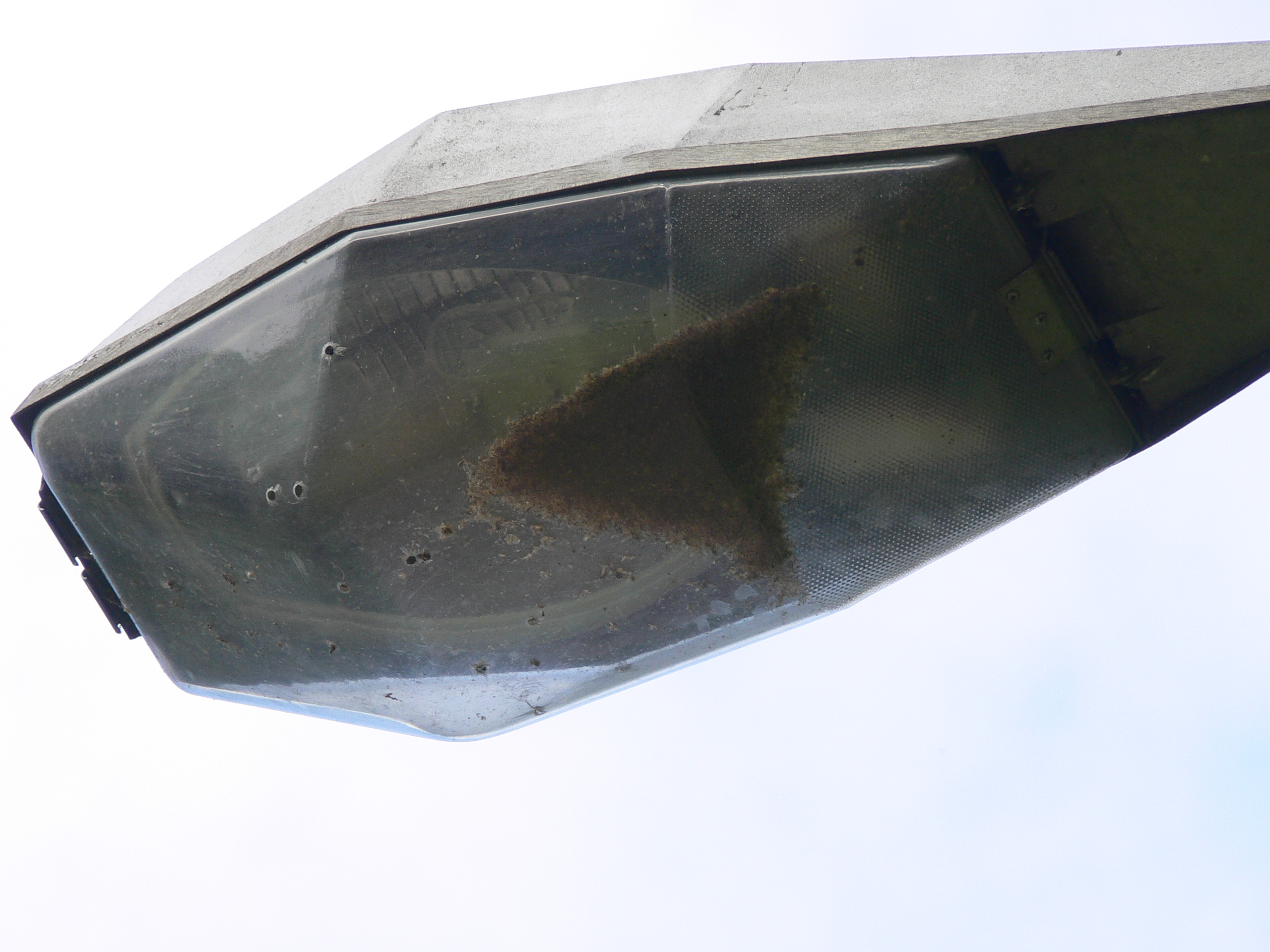 Ce lampadaire situé en lisière d'une zone boisée, a été dégradé par une volée de grenaille de plomb de chasse. Il a piégé des milliers de petits insectes attirés par la lumière. Rem : une partie de ces mêmes insectes auraient peut-être été mangés par des chauve-souris s'il n'y avait pas eu de trous. En écologie un phénomène de cette nature est dit "puits". Cette photographie montre que d'autres espèces que les papillons nocturnes sont attirées par la lumière)